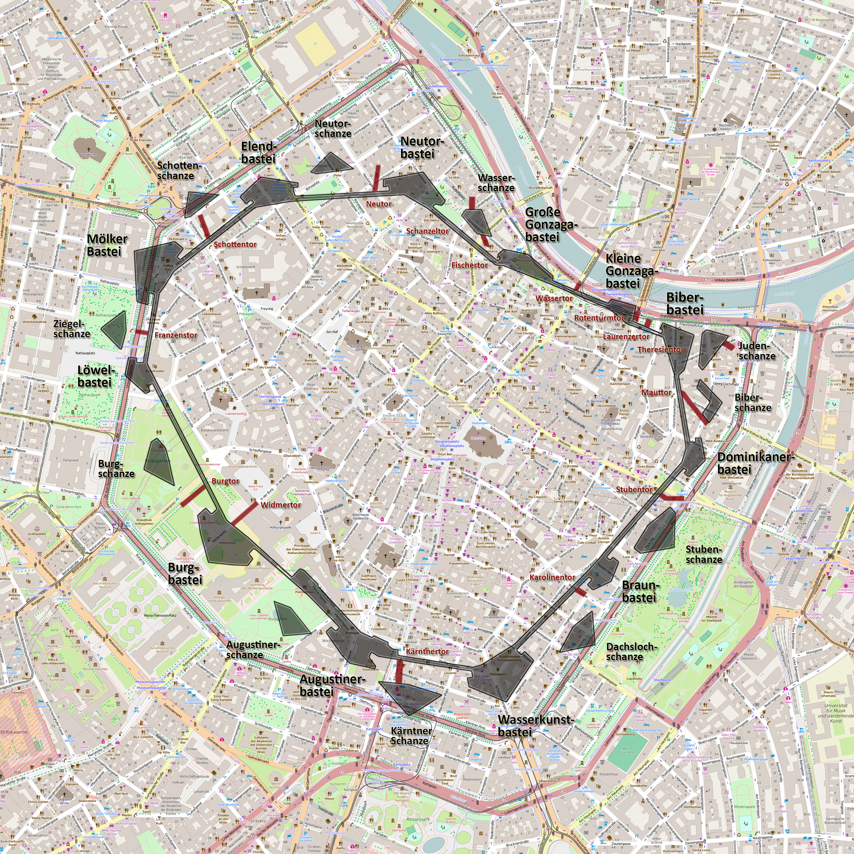 Wiener Stadtbefestigung, Basiskarte: Open Street Map, Grafik: user:Gugerell This map may be incomplete, and may contain errors. Don't rely solely on it for navigation.